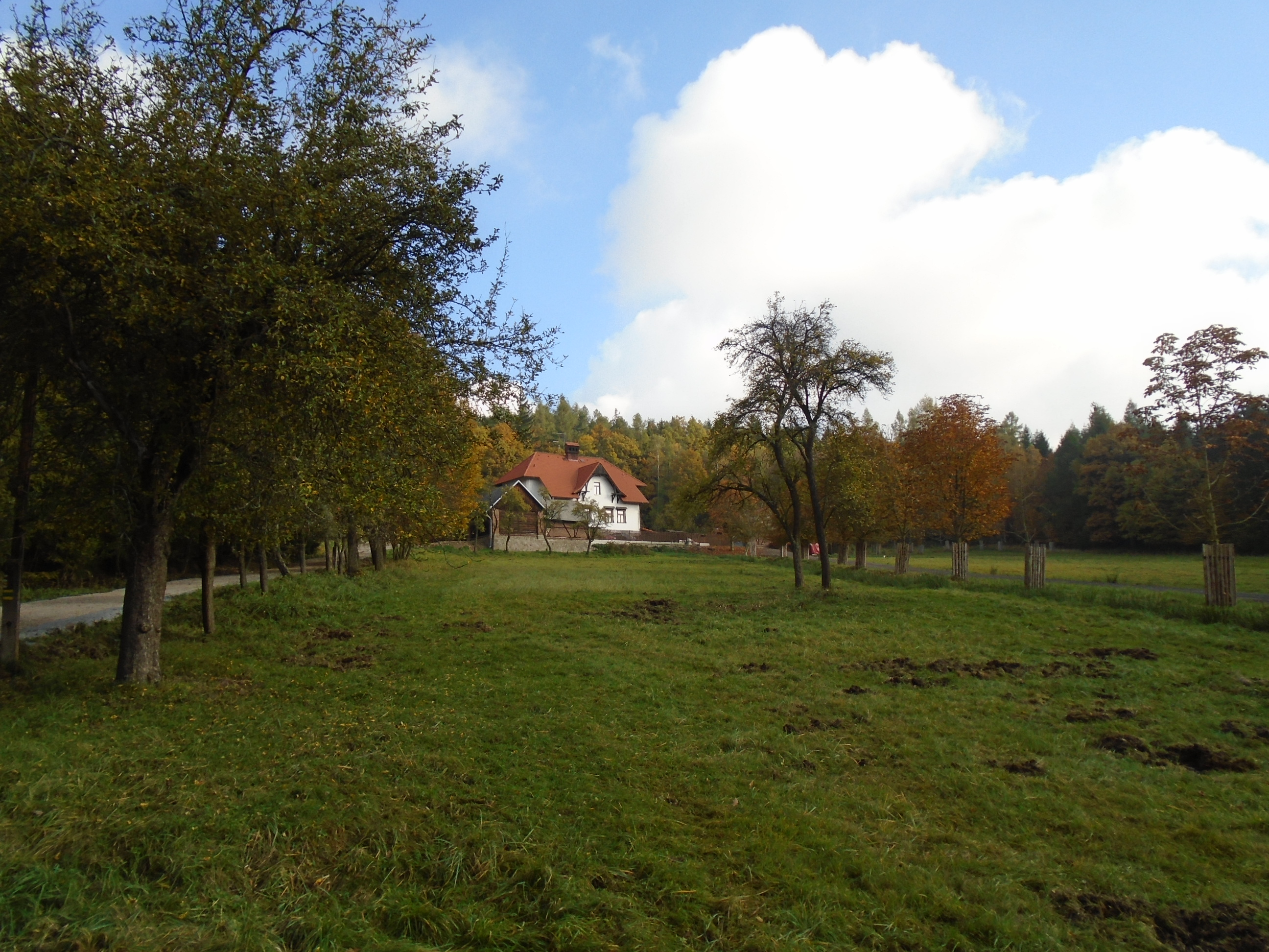 Hájovna Jelení palouky čp.1